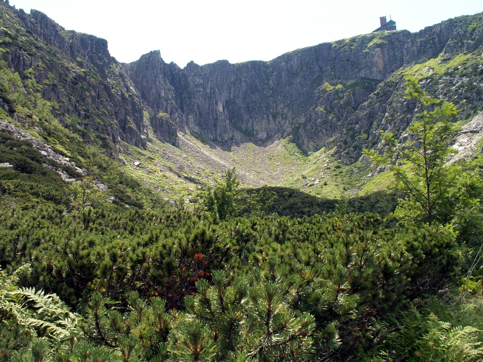 Śnieżne Kotły, Karkonosze, Dolny Śląśk, Polska.